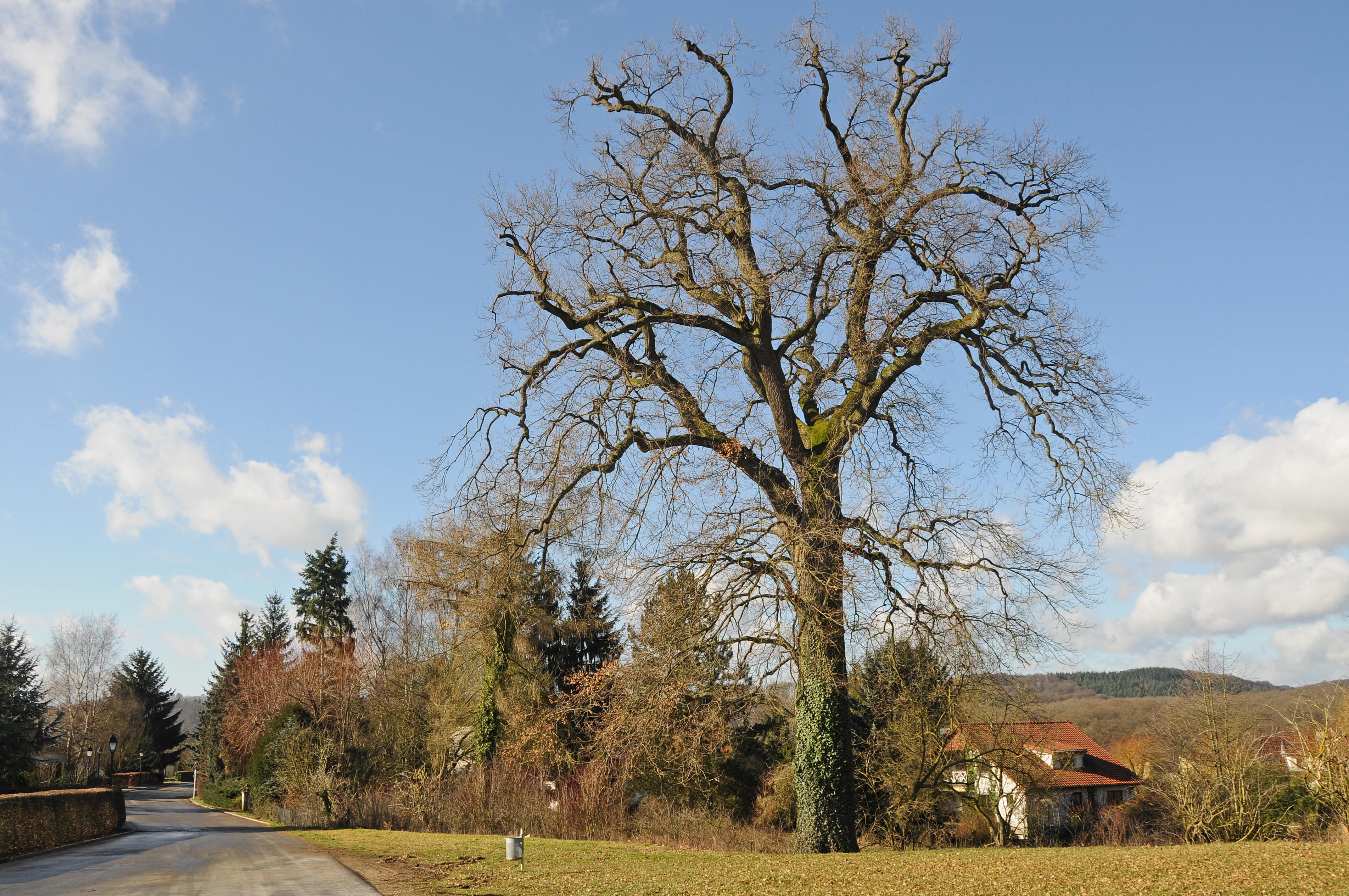 Eech zu Mutfert.